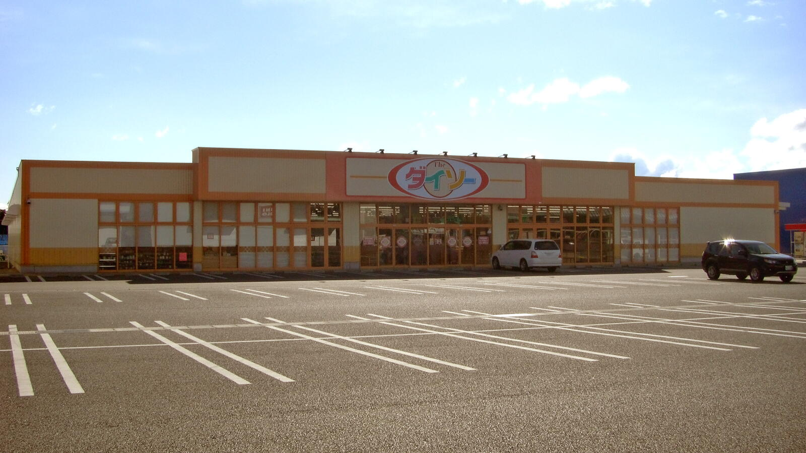 ザ・ダイソーフレスコキクチ原町SC店（※現在は閉店）